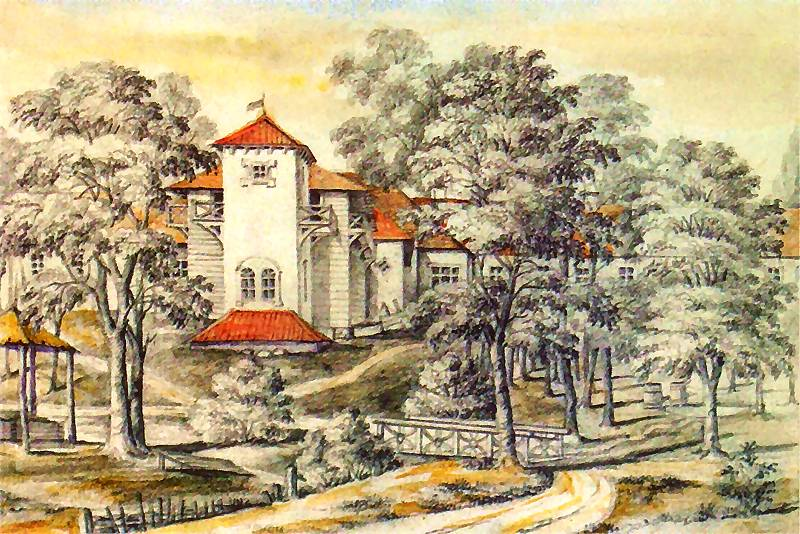 Беларуская (тарашкевіца): Друскенікі (Druskieniki)